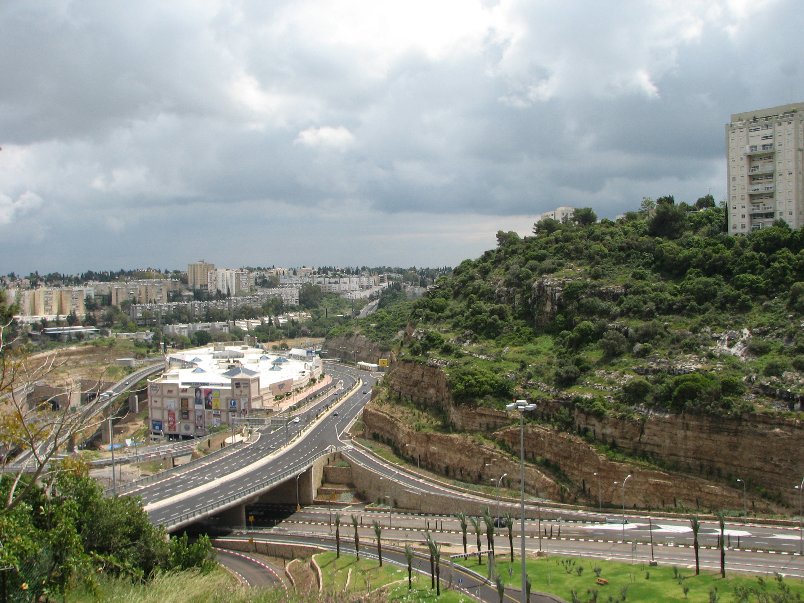 Ramot Sapir, Neighborhood, Haifa Israel רמות ספיר, על שם פנחס ספיר, נמצאת במבואותיה המערביים של נווה שאנן, וגובלת ברוממה. היא הוקמה בתחילת שנות ה-80 מימין בית משכונת רמות ספיר, במרכז מערכת הכבישים, מרכז הקניות גרנד קניון, משמאל בתי שכונת יזרעאליה